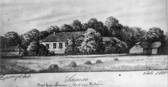 Samma mõis